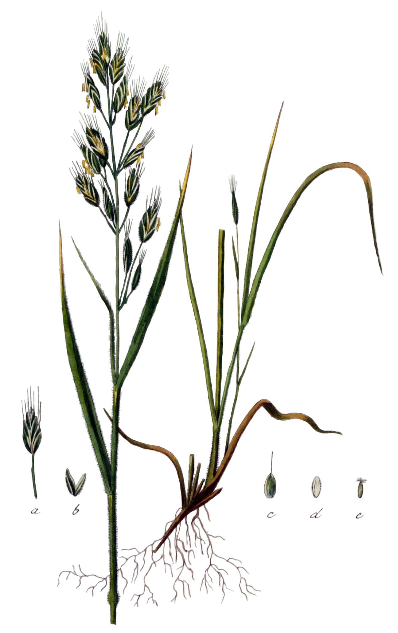 Bromus hordeaceus L. (Syn. Bromus mollis L.)